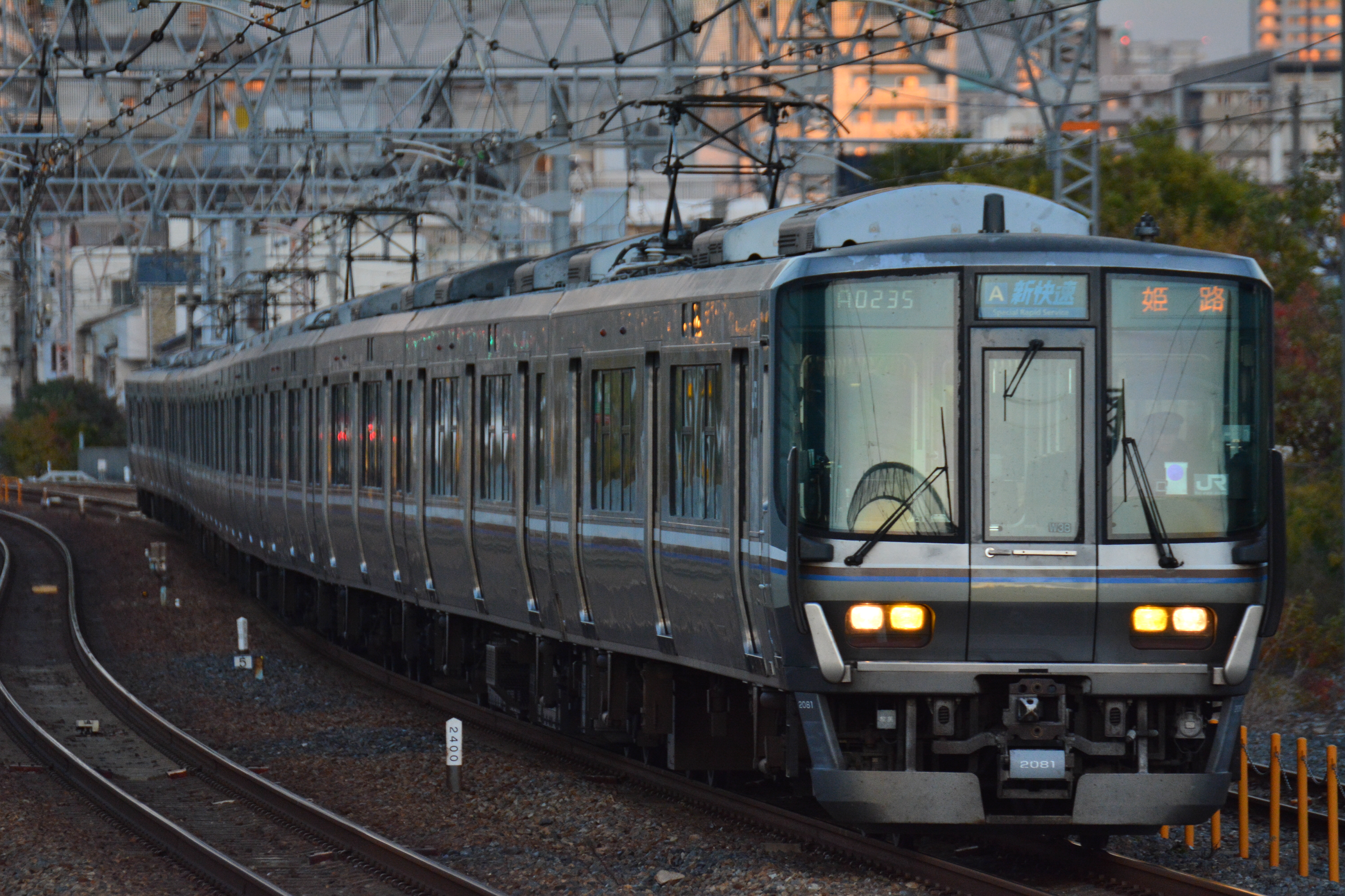 223系W38編成